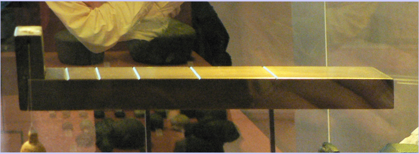 Indicateur solaire : règle en L trouvée dans la tombe d'Aménophis III, Musée du Louvre, Paris.